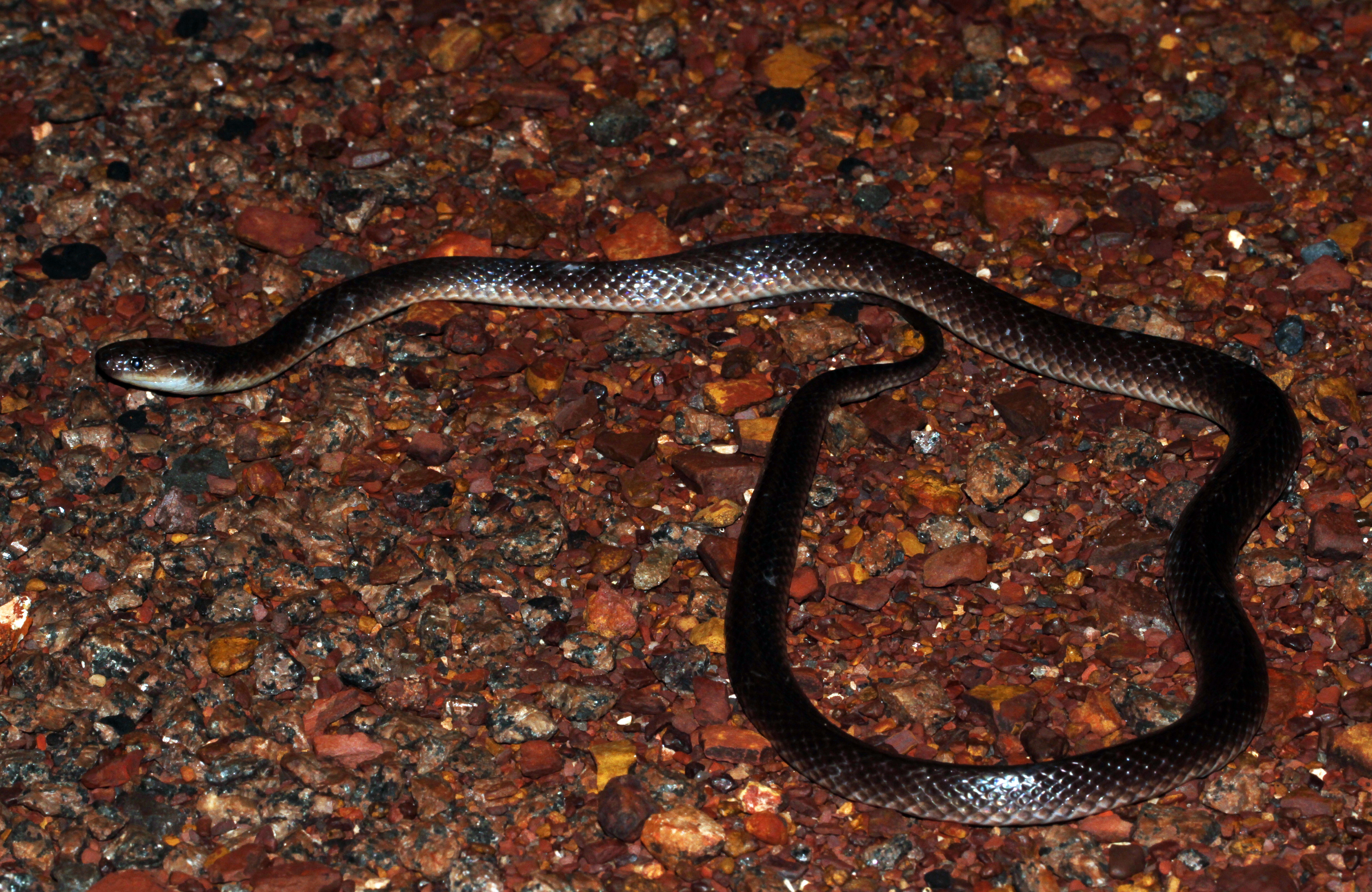 Kakadu NT.